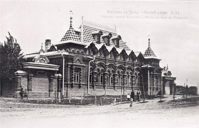 Ростов-на-Дону, здание училища имени Токарева